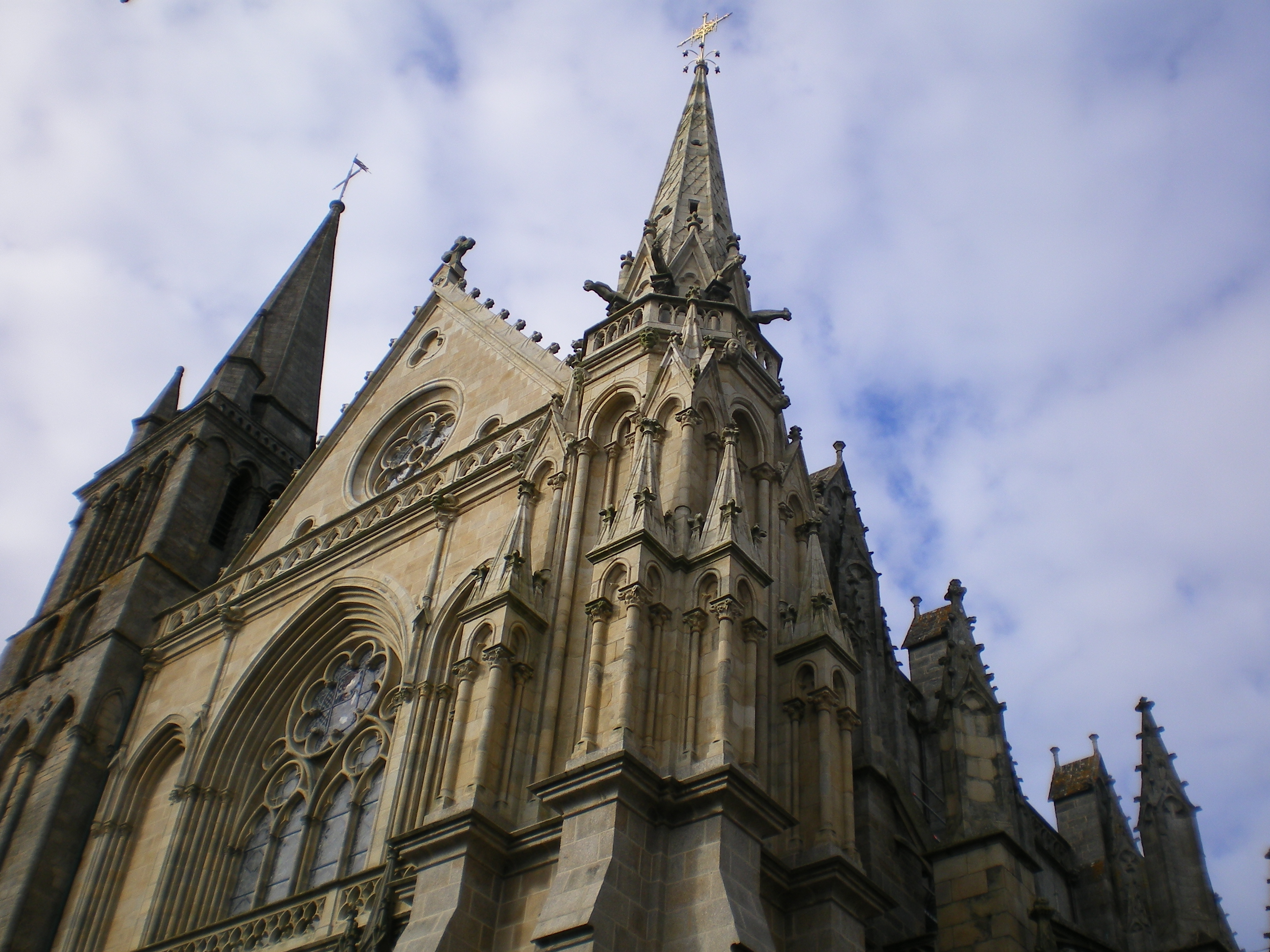 Cathédrale Saint-Pierre de Vannes (Morbihan).